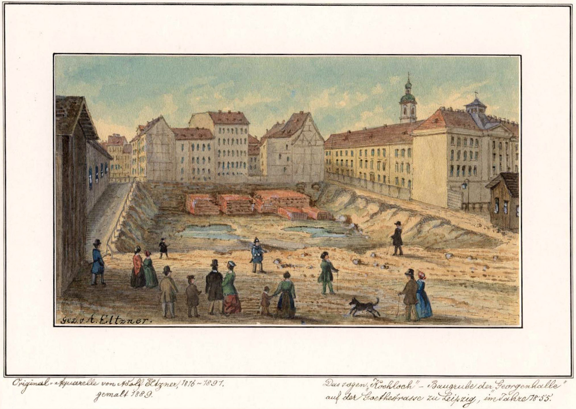 Das sogen. „Kochloch“ – Baugrube der „Georgenhalle“ auf der Goethestrasse zu Leipzig, im Jahre 1855. Aquarell von Adolf Eltzner, gemalt 1889.Rechts im Bild das 1870/71 abgebrochene Georgenhaus; Blick in Richtung Westen.